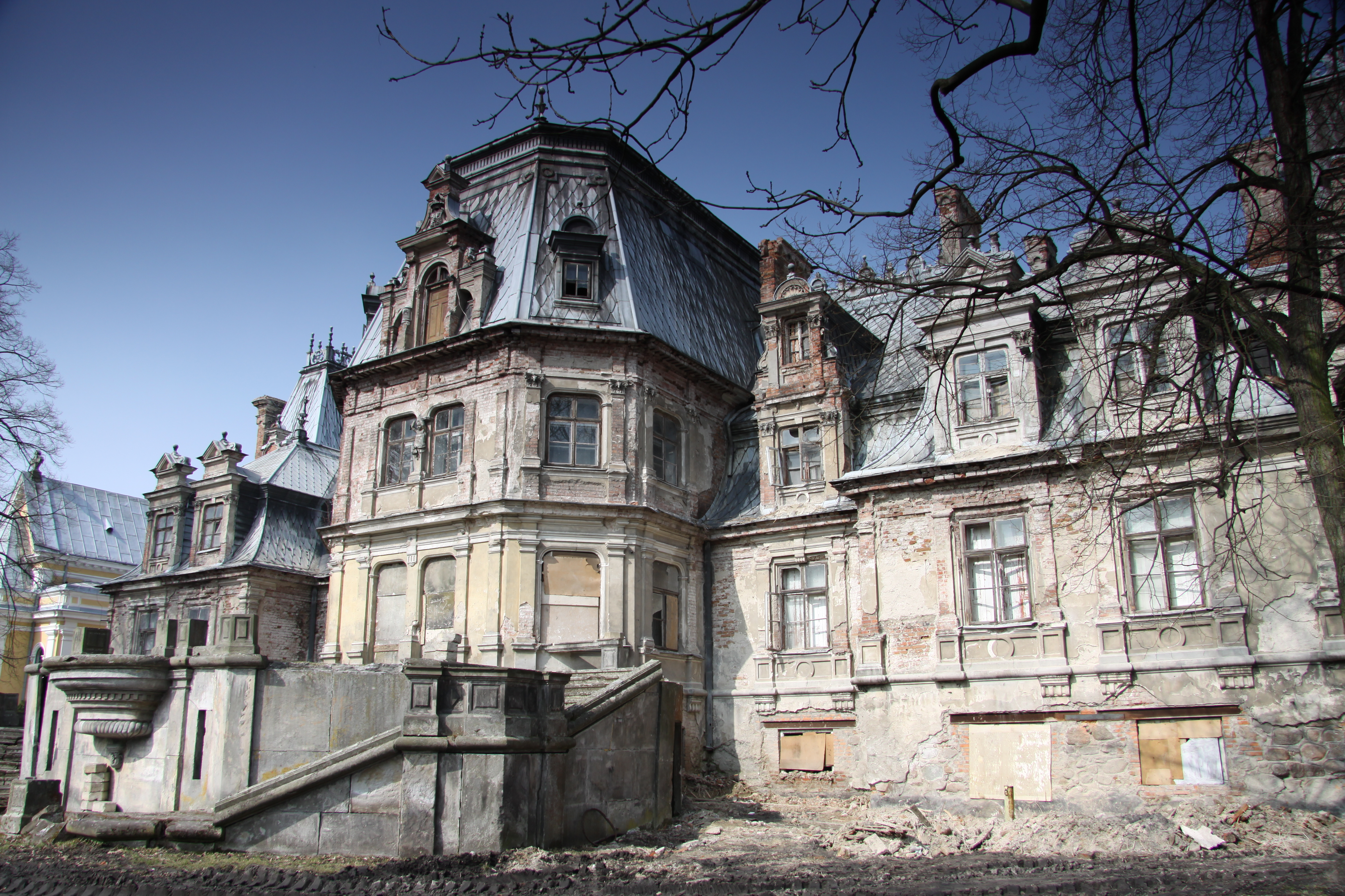 Zespół pałacowy Guzów